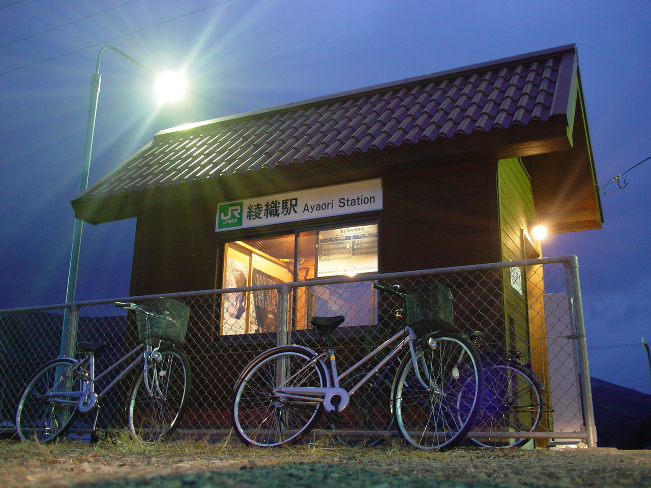 （綾織駅）